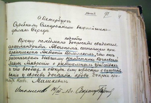 Дело об убийстве Ющинского. Письмо следователя Н.Машкевича петербургскому следователю по особо важным делам Середе от 14.03.1913: «Прошу немедленно допросить архимандрита Автонома, состоящего при архиепископе Антонии Волынском, что он рассказывал бывшему наместнику Почаевской Лавры Амвросию о ритуальных убийствах и откуда ему известно о существовании у евреев догмата крови. Допрос пришлите в Киев. Н.Машкевич File about murder of Jushchinsky. The letter of investigator N.Mashkevich to the Petersburg investigator on especially important issues Sereda, 14.03.1913: "I Ask to interrogate immediately archimandrite Avtonom consisting at archbishop Antony of Volyn that it told to the former deputy of Pochaevsky Monastery Amvrosy about ritual murders and whence it knows about existence at Jews of a doctrine of blood. Interrogation send to Kiev. N.Mashkevich".